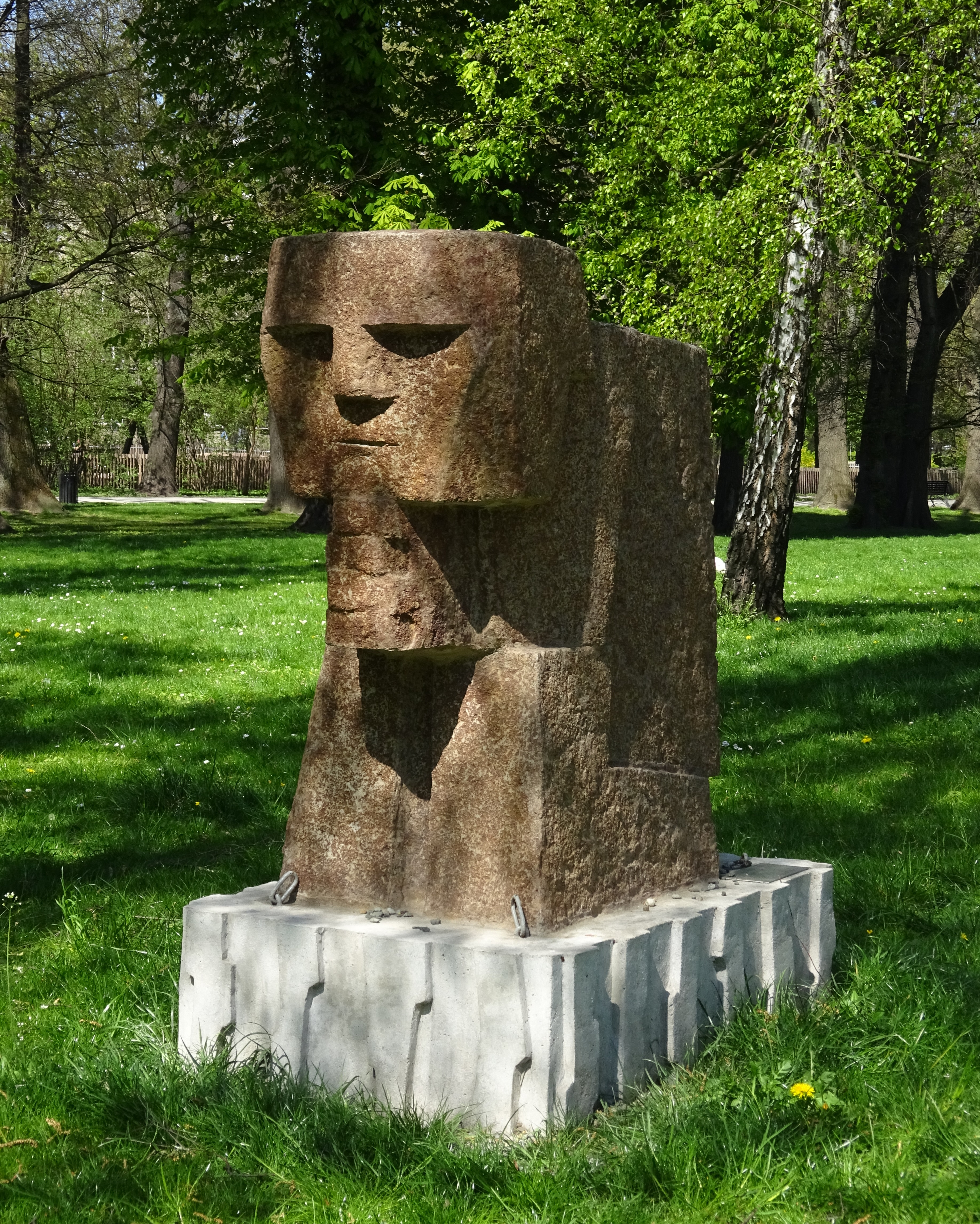 Rzeźba „Zafrasowanie”, autorstwa Romana Tarkowskiego z II połowy XX wieku, znajdująca się w Parku Krakowskim w Krakowie.